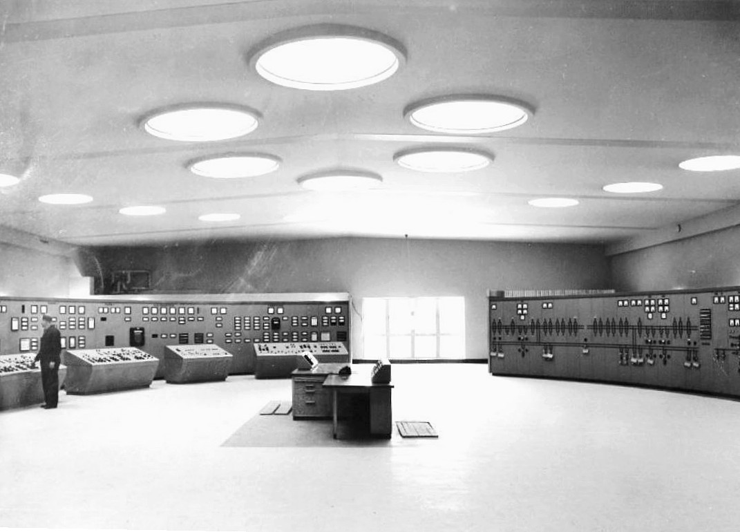 Hässelby värmeverk, kontrollrummet i sin ursprungliga skepnad med taklanterniner som följer rummets form. Källa SSA